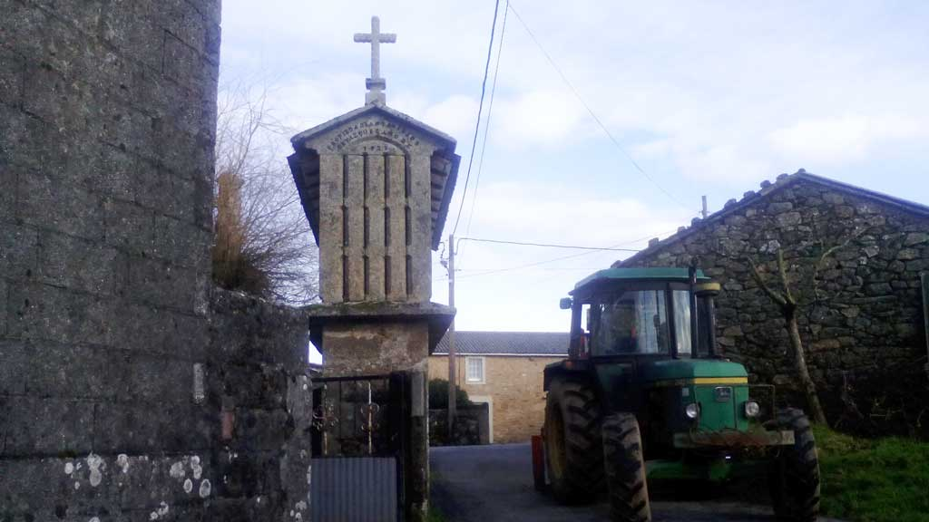 Vista de Martín.